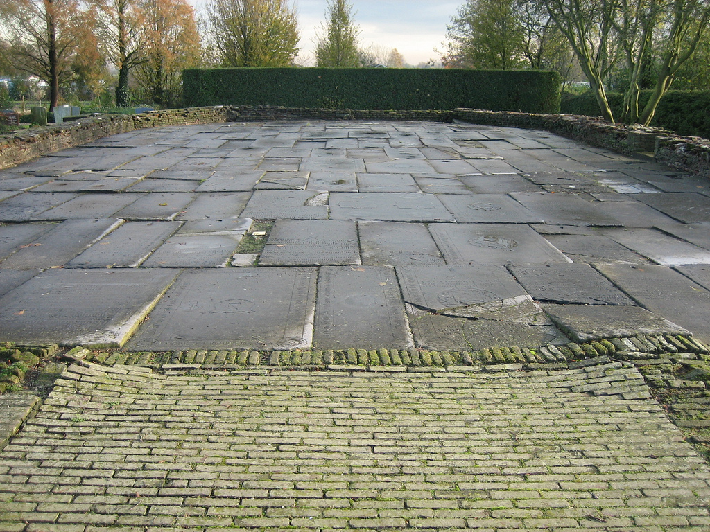 17068 Graft zerkenvloer